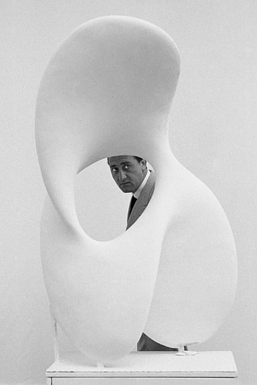 Vèneto: Alberto Viani scultura con Alberto Sordi